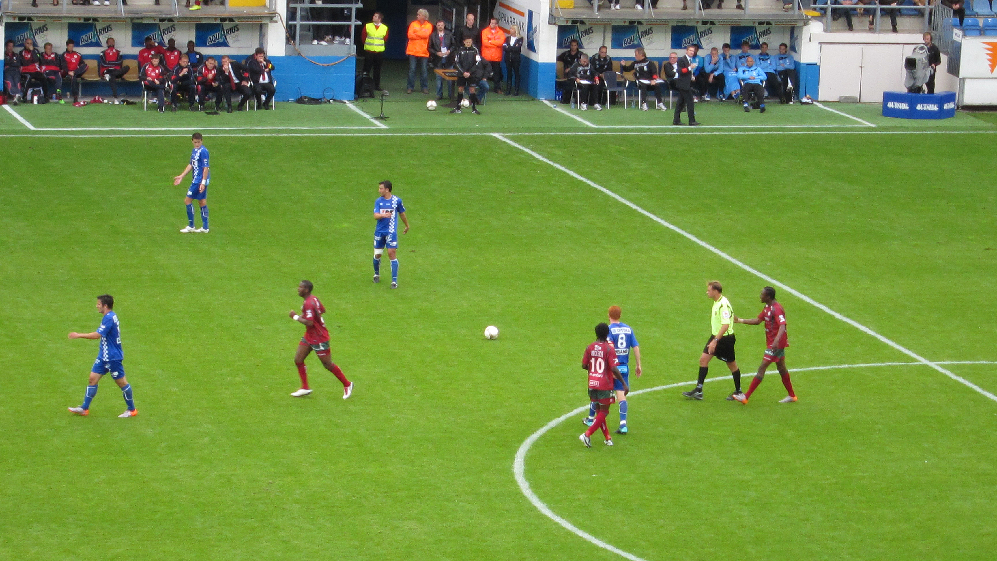 Het Jules Ottenstadion tijdens de wedstrijd op 19 sep 2010 tegen Zulte-Waregem